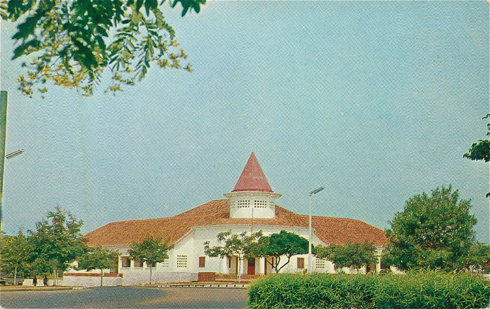 Postcard: Foto Serra No 143 - Edifício do Centro de Estudos da Guiné Portuguesa- Bissau